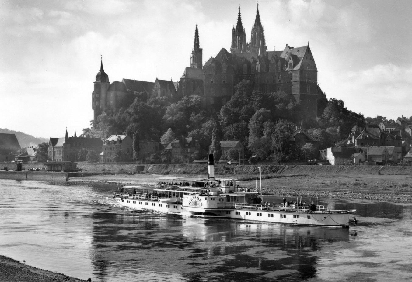 Meißen; Albrechtsburg und Dom - Elbe mit Dampfer Meißen This postcard is from publisher Brück & Sohn in Meißen ( postcard has a unique number 28883 and is available in a higher resolution at the publisher. This images was uploaded in a cooperation project between Wikipedians and the publisher.